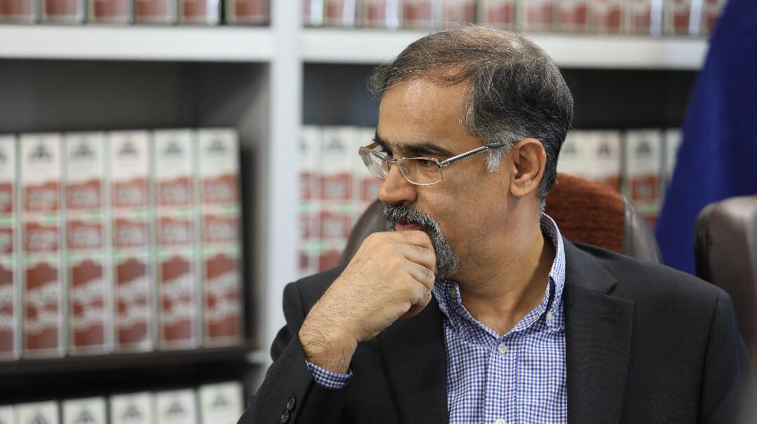 دکتر عباس کریمی در مرکز پژوهشی دانشنامه های حقوقی علامه